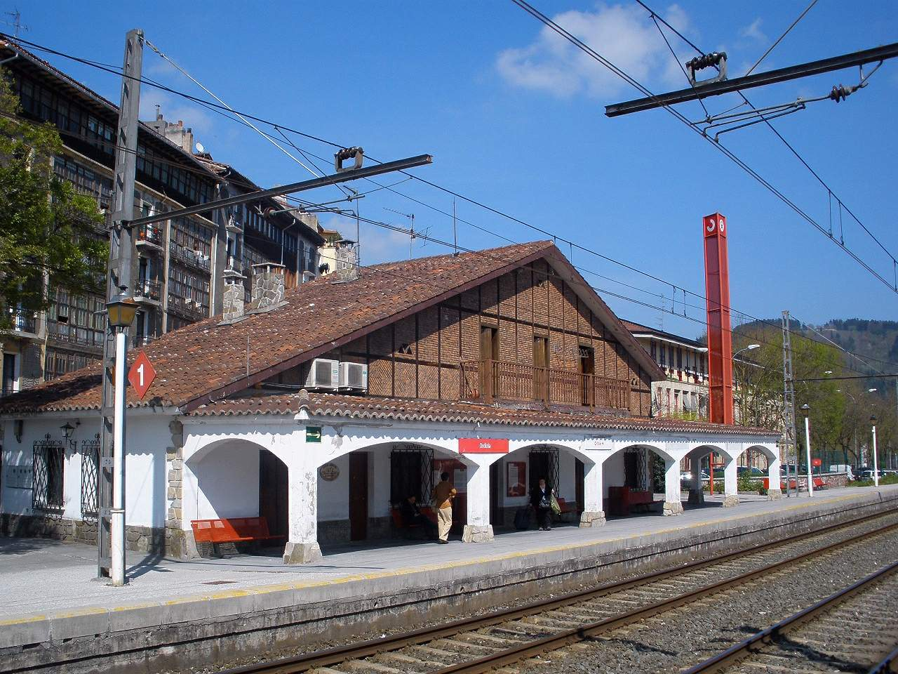 Ordizia, Guipúzcoa